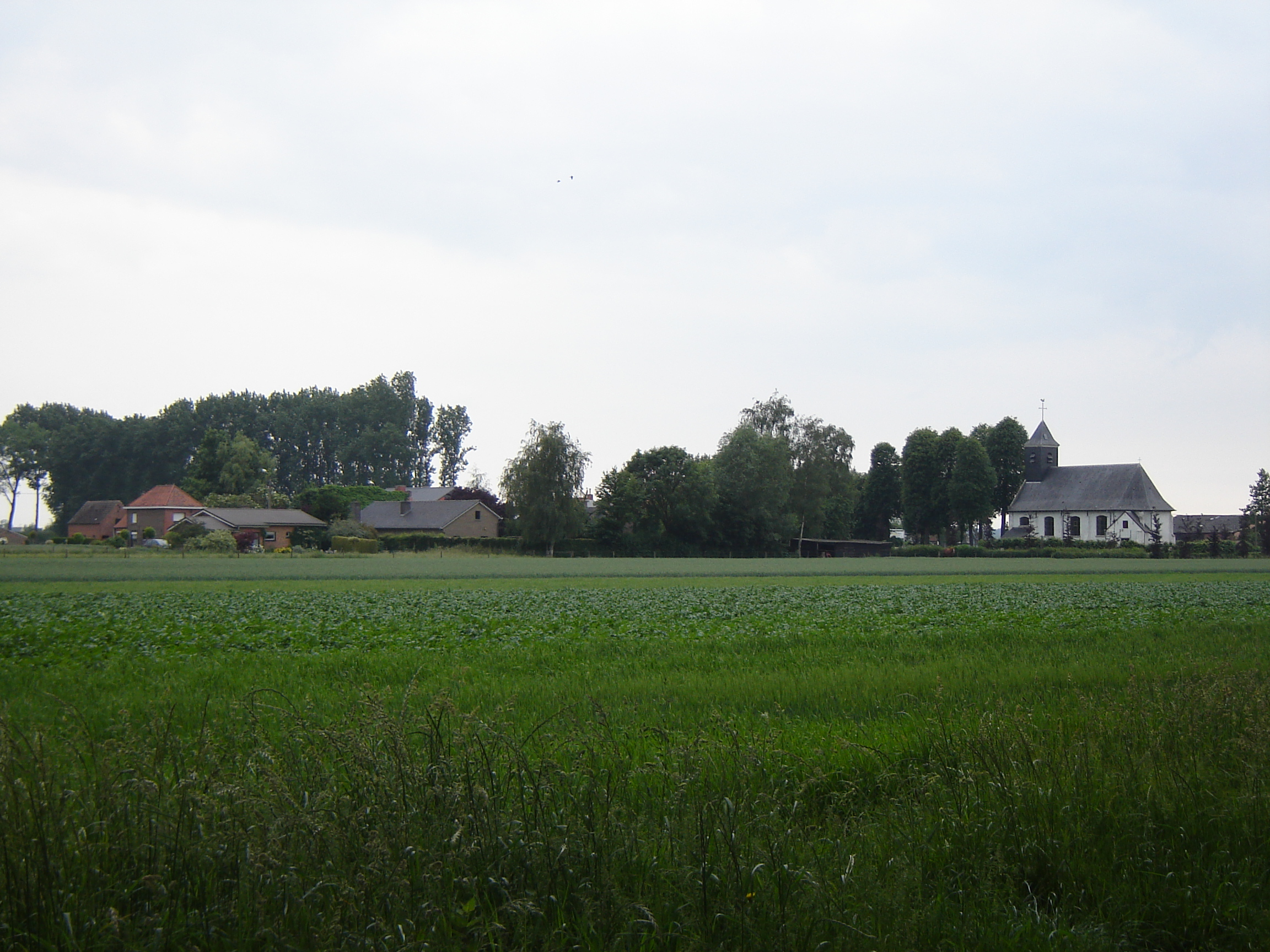 Uitzicht op Sint-Jan-in-Eremo (gezien vanaf de Hogestraat) View on Sint-Jan-in-Eremo (as seen from the Hogestraat street). Sint-Jan-in-Eremo, Sint-Laureins, East Flanders, Belgium